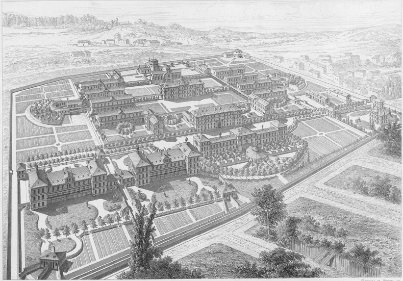 Légende originelle de la gravure : Asile d'aliénés de Sainte-Anne, à Paris Vue à vol d'oiseau